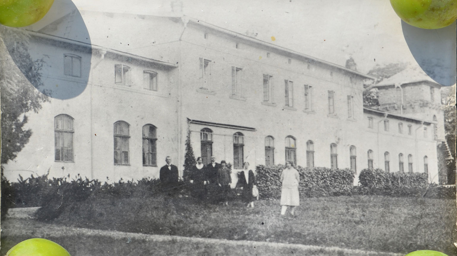 Wyjątkowe zdjęcie z lat 30-tych XX wieku. Sapiehowie przed nieistniejącą rezydencją w Bilczych Złotych (obecnie Ukraina). Fotografię dostałem ze zbiorów mieszkańca Bilczych Złotych.